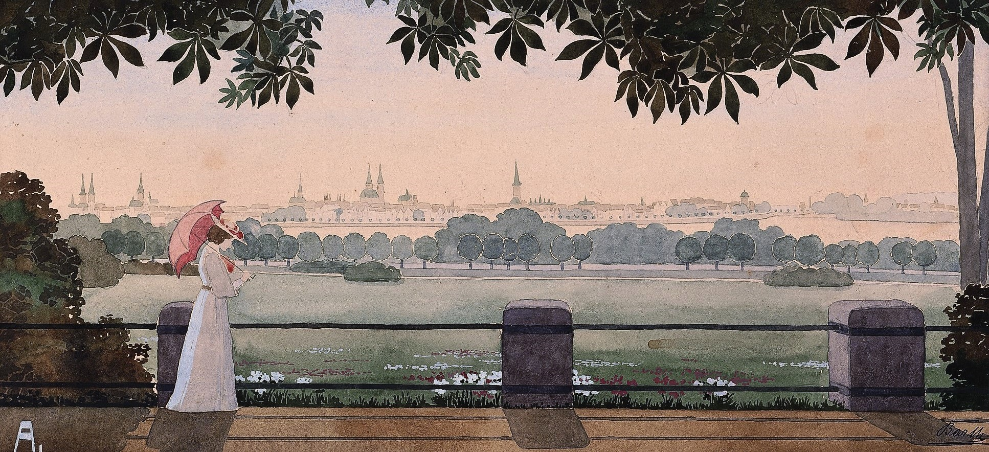 Perspektivische Ansicht der Platzanlage mit Blick auf die Stadt (Blickrichtung »A«)